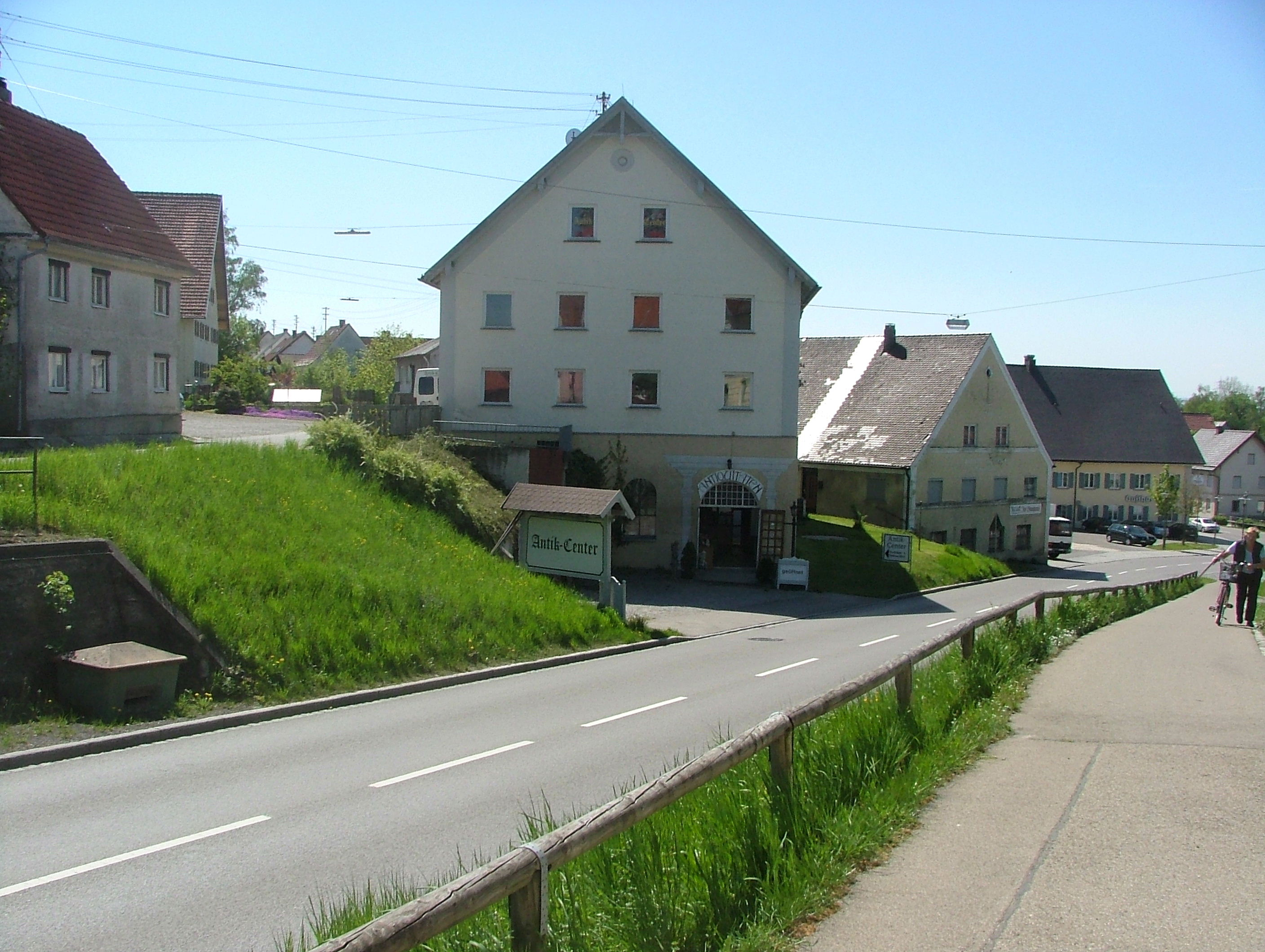 Heimertingen, das mittlere Haus, die sogenannte Hirschbrauerei wurde 2007 abgebrochen